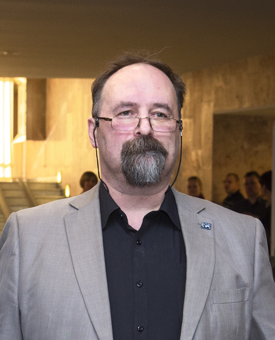 Teeneteristi kavaler Karmo Tüür